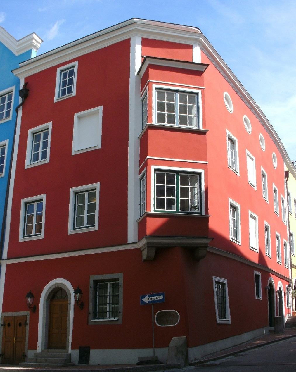 Gebäude der ehemaligen Konzernzentrale der Kapsreiter-Gruppe am unteren Stadtplatz Schärding